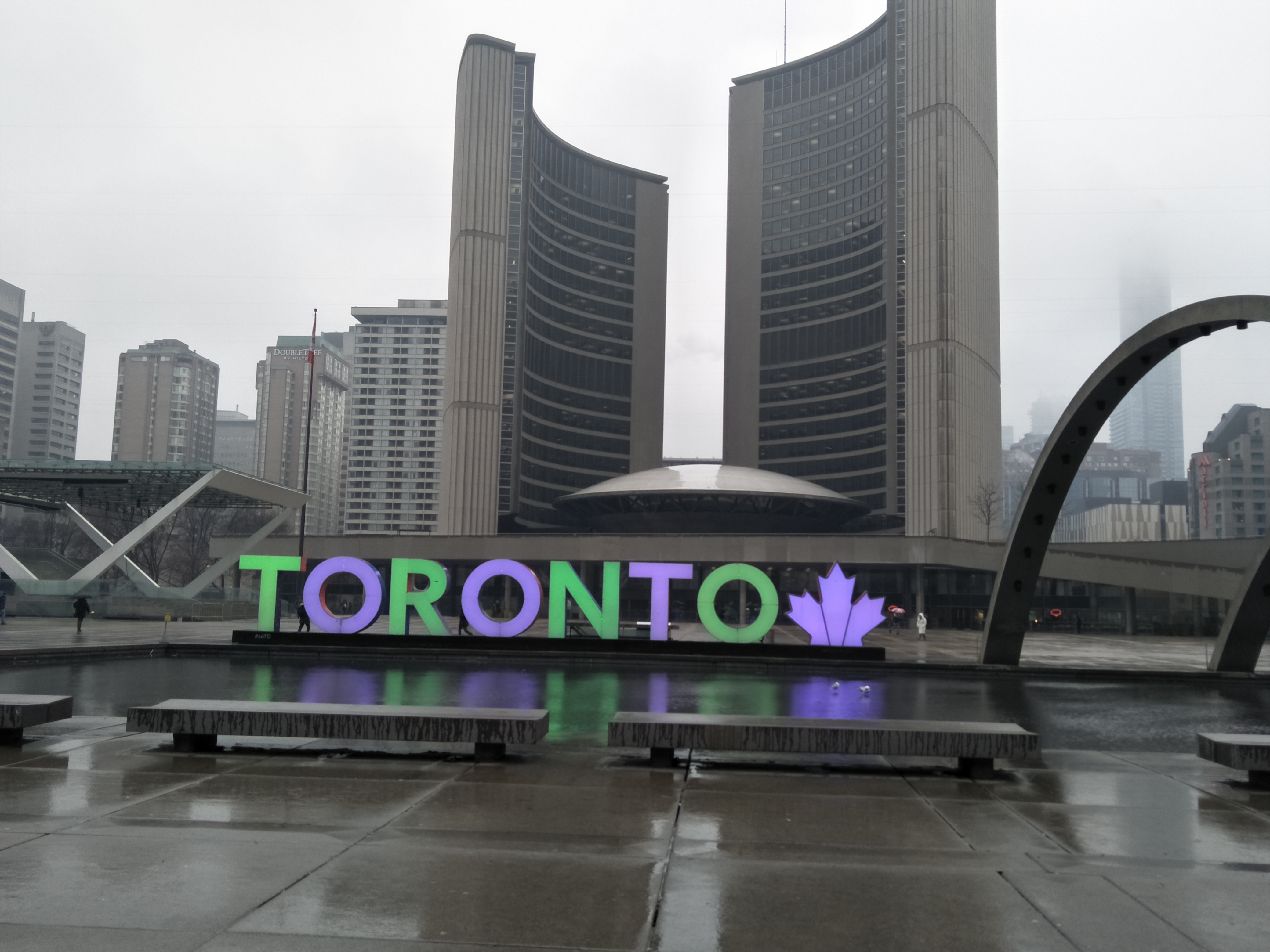 Foto ini merupakan balai kota Toronto